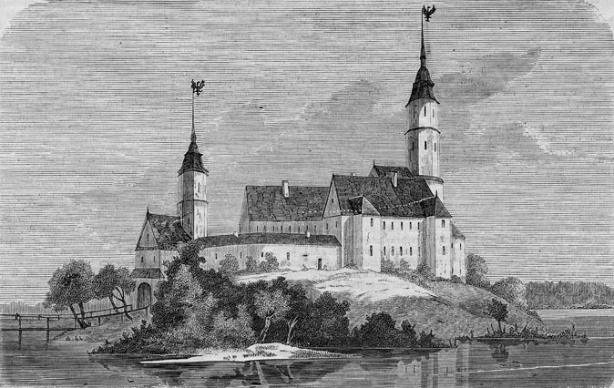 Беларуская (тарашкевіца): Нясьвіж (Niaśviž), замак Радзівілаў (Radzivił)